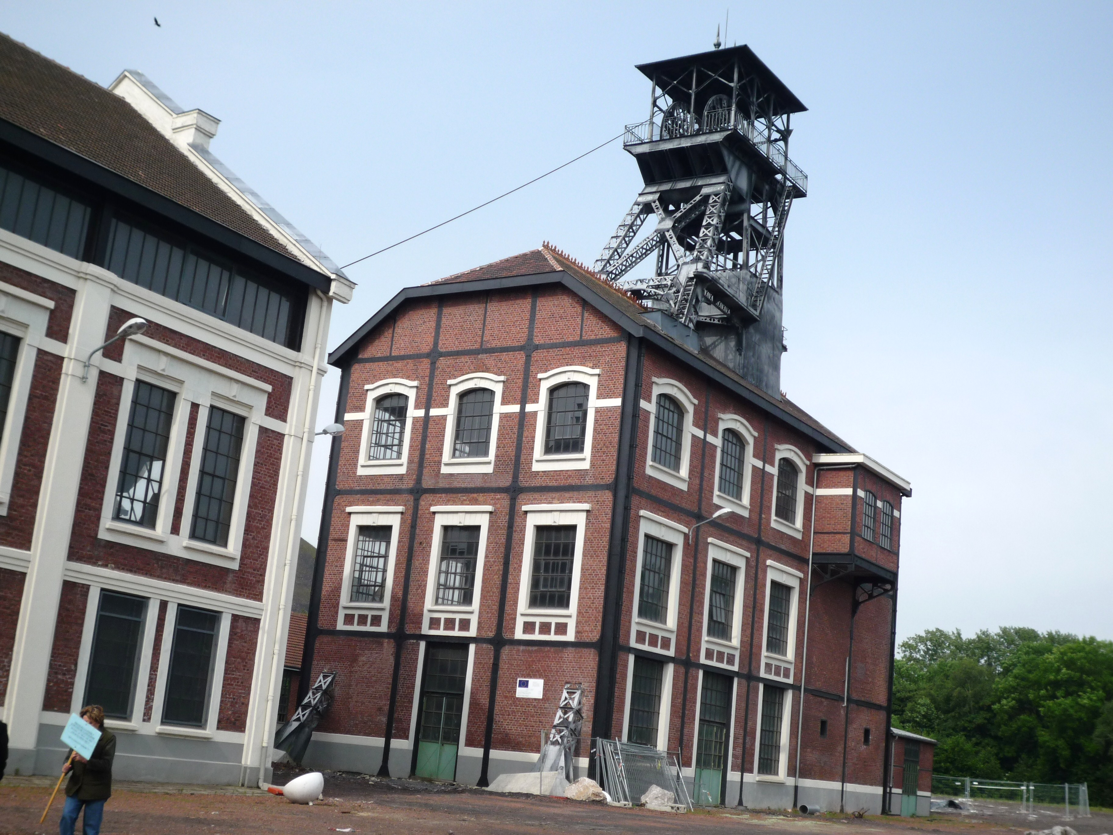 This building is en partie classé, en partie inscrit au titre des Monuments Historiques.